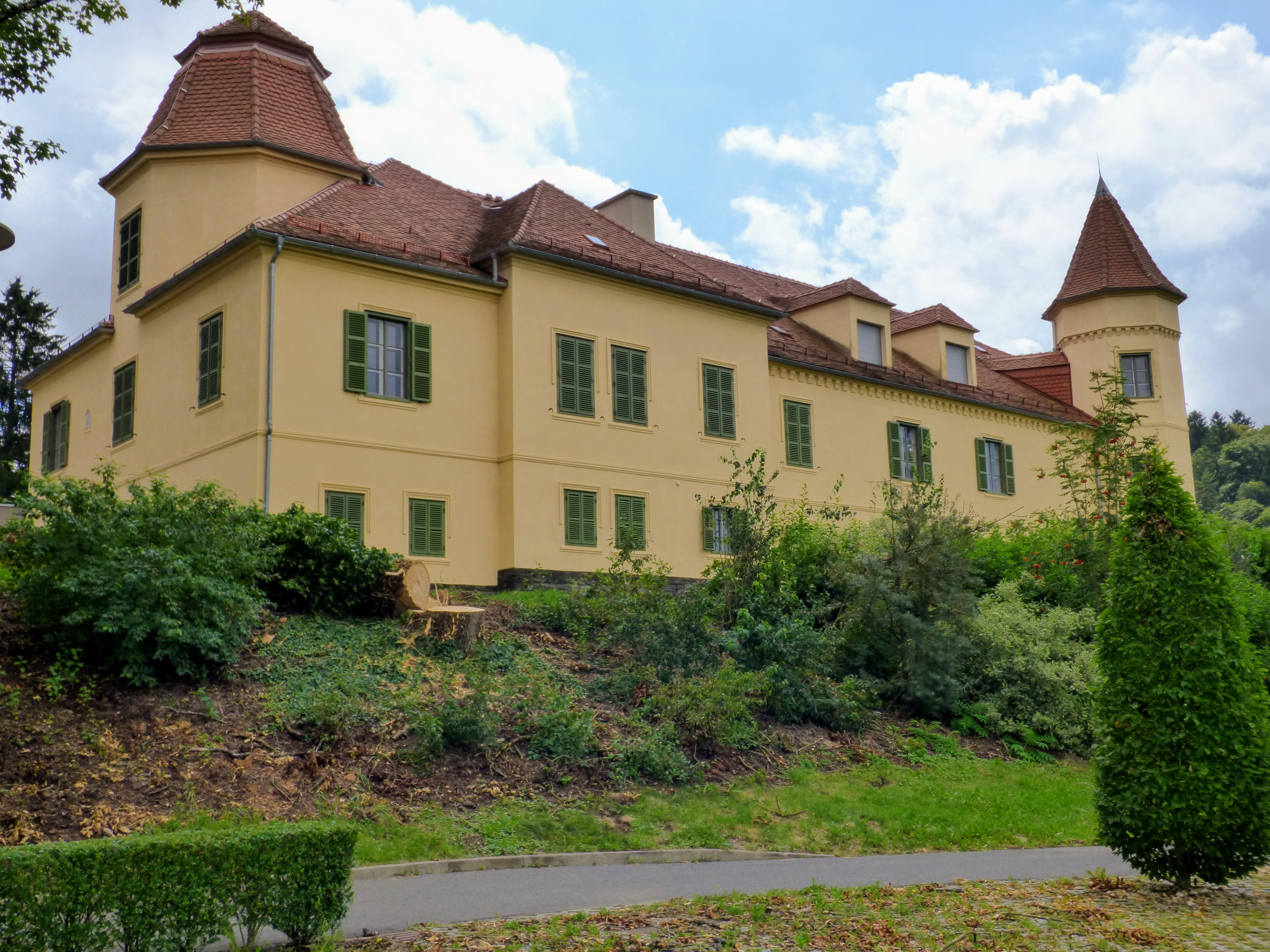 Schloss Stein (heute Landwirtschaftliche Hauswirtschaftsschule) Gemeinde Fehring, Steiermark